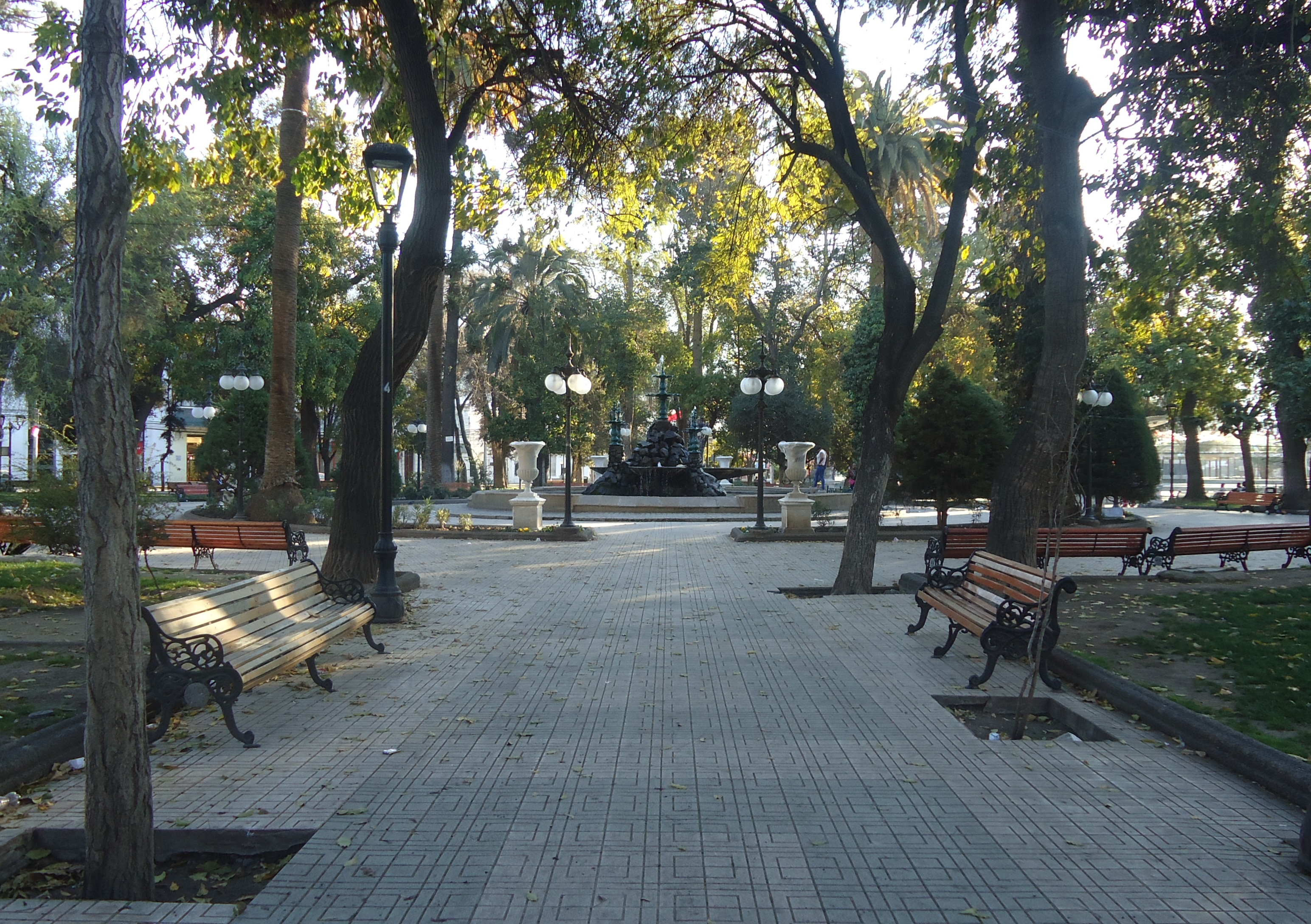 Vista del principal paseo publico